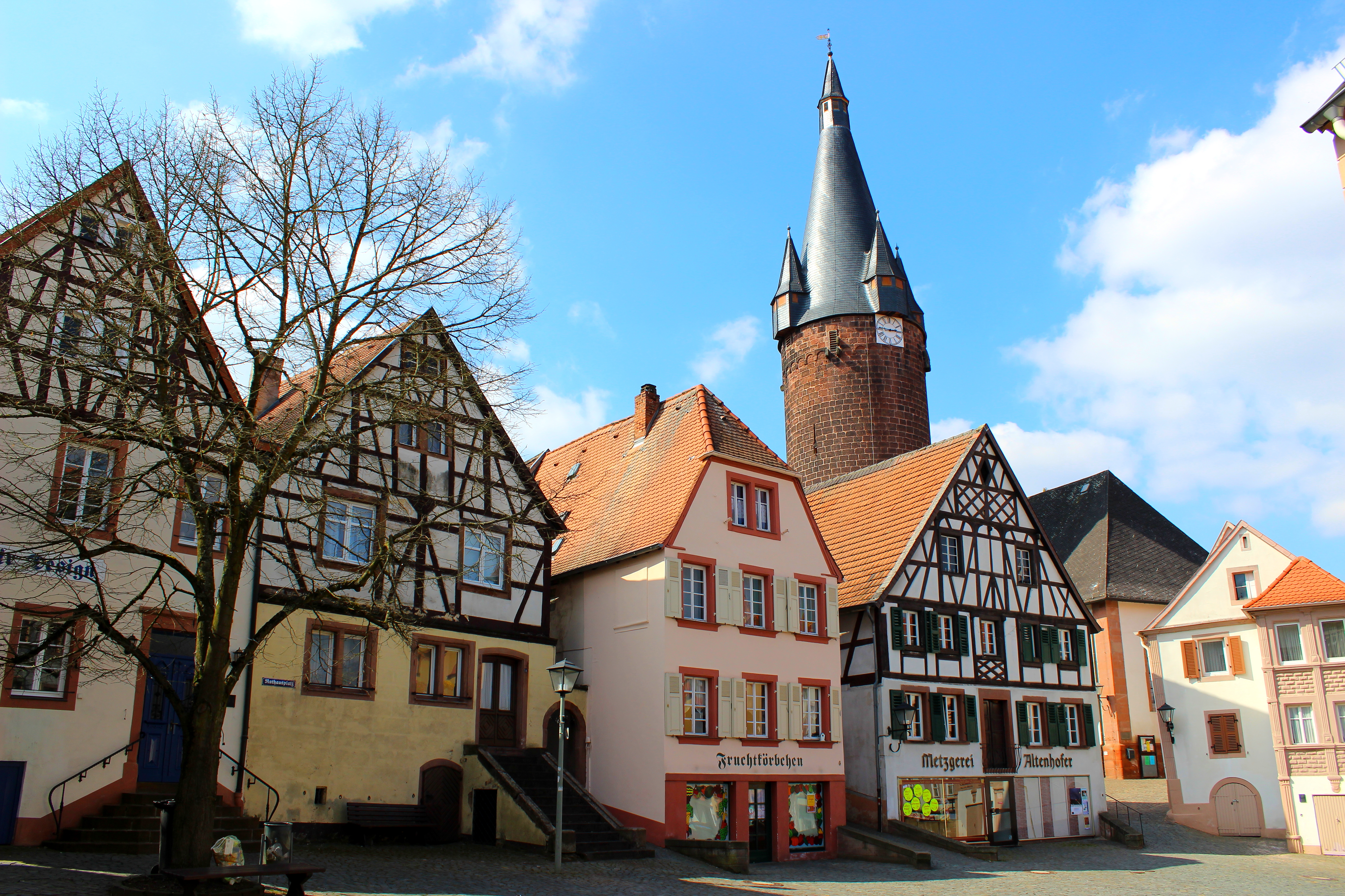 Rathausplatz, Ottweiler, Landkreis Neunkirchen, Saarland